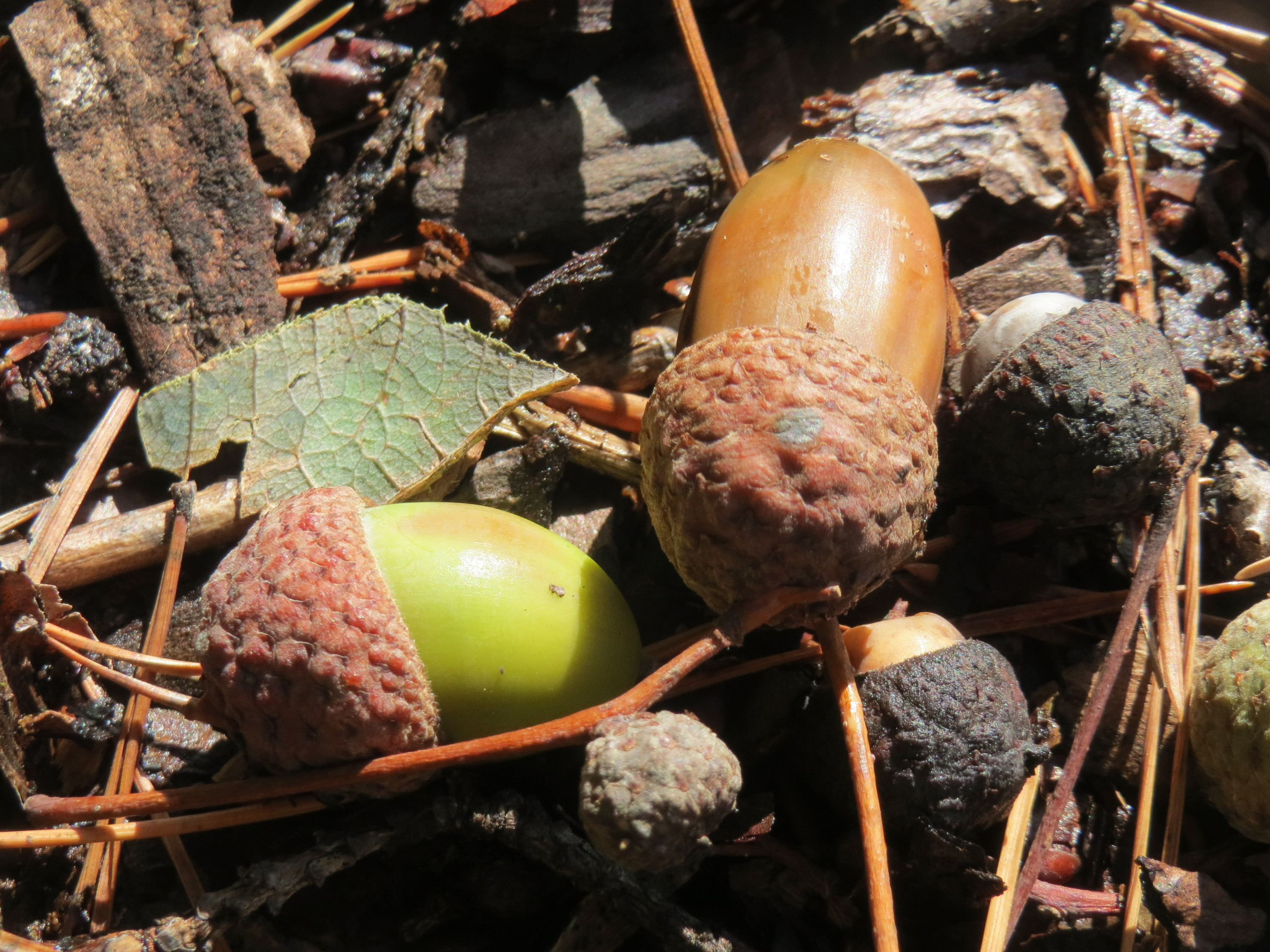 Früchte der Stieleiche (Quercus robur) in der Schwetzinger Hardt